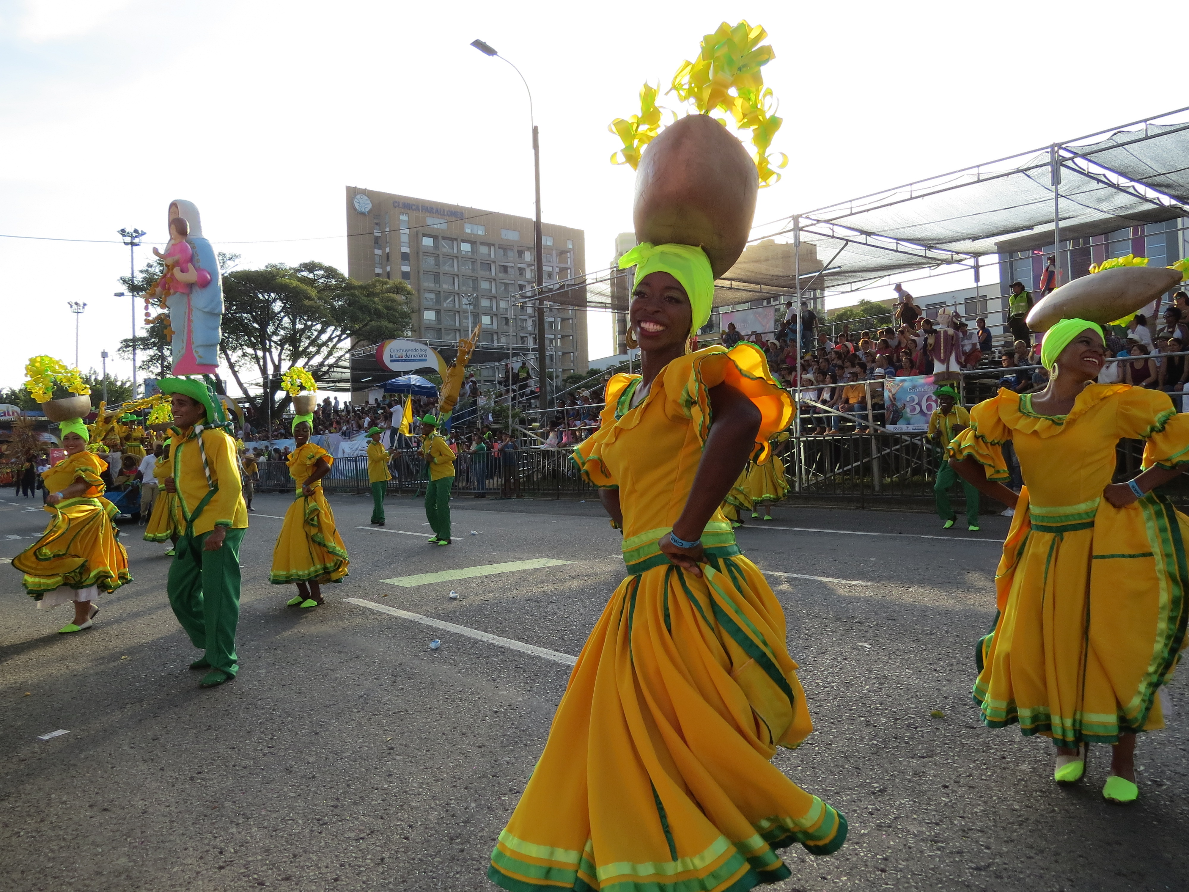 Dentro del hermoso festival que tiene Cali finalizando cada año, se encuentra este hermoso desfile, el cual es adornado con diversas comparsas alusivas a lo más típico de la capital Vallecaucana. EL CARNAVAL DEL CALI VIEJO, tuvo su versión número 58 este año, con grandes influencias del Pacifico Colombiano que representan la identidad de un Caleño Típico.